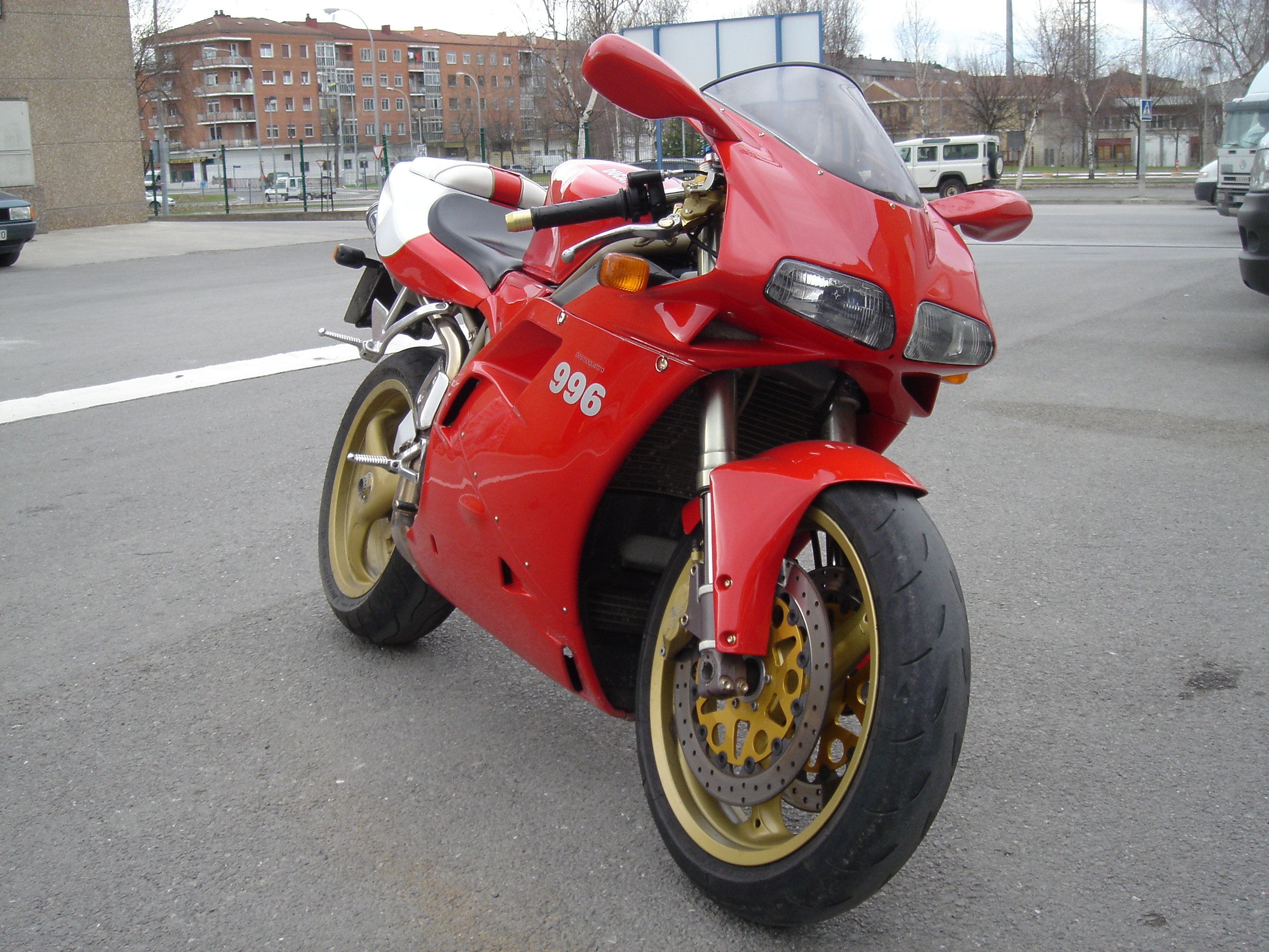 DUCATI 996 LOOK SPS